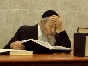 Rabbi Moshe Shmuel Shapiro, rosh yeshiva, Be'er Yaakov, in 2003.